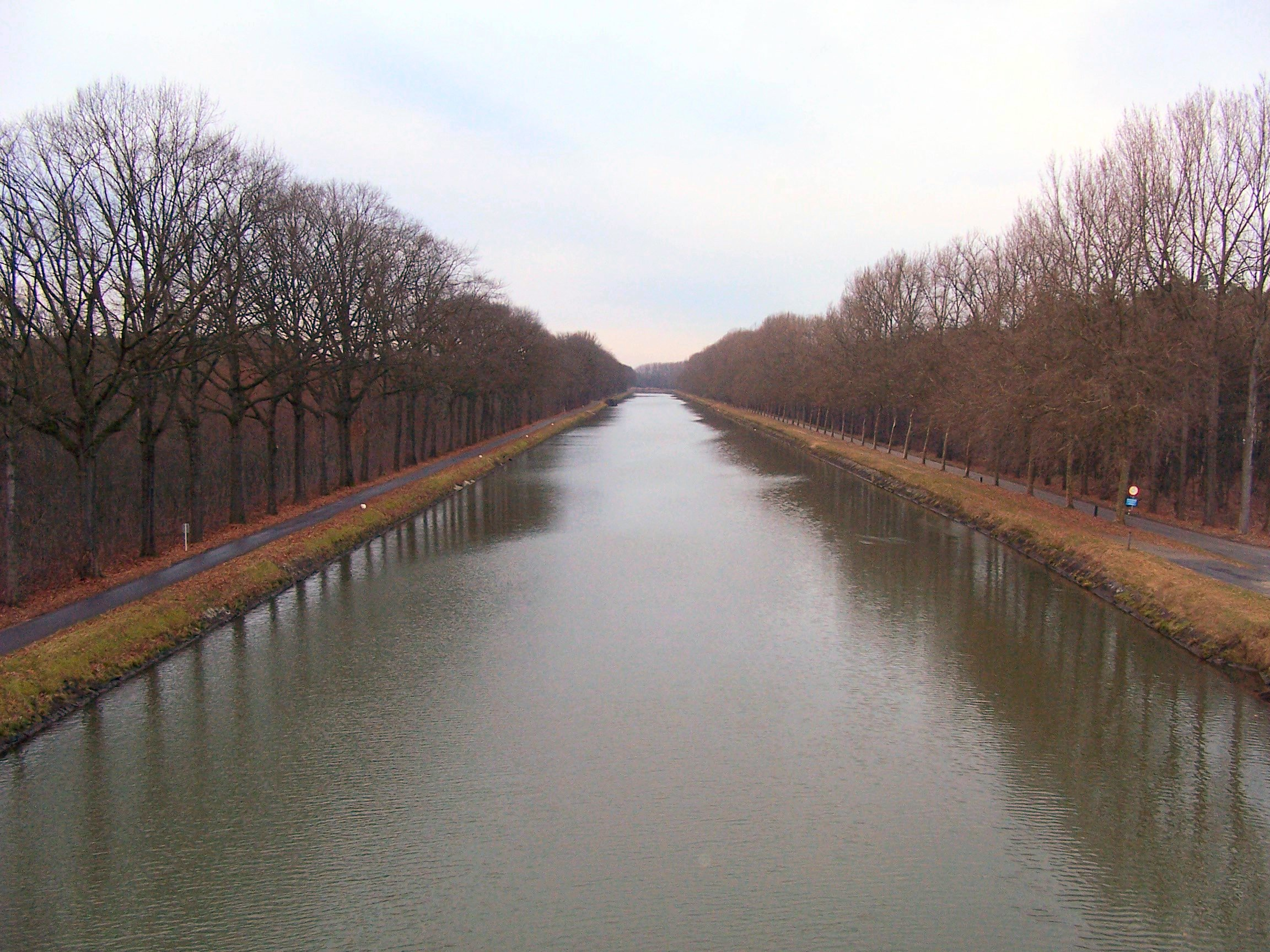 Het Kempens Kanaal (Kanaal Bocholt - Herentals) in de buurt van Sint-Huibrechts-Lille.